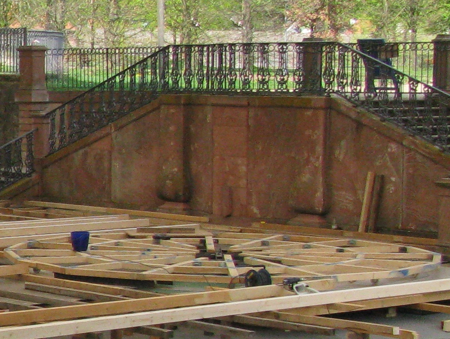 Unterkonstruktion einer Drehscheibe mit 6 Meter Durchmesser. Die Drehscheibe ist komplett aus Holz gefertigt und wurde im Rahmen der Brüder-Grimm-Märchenfestspiele in Hanau eingesetzt.